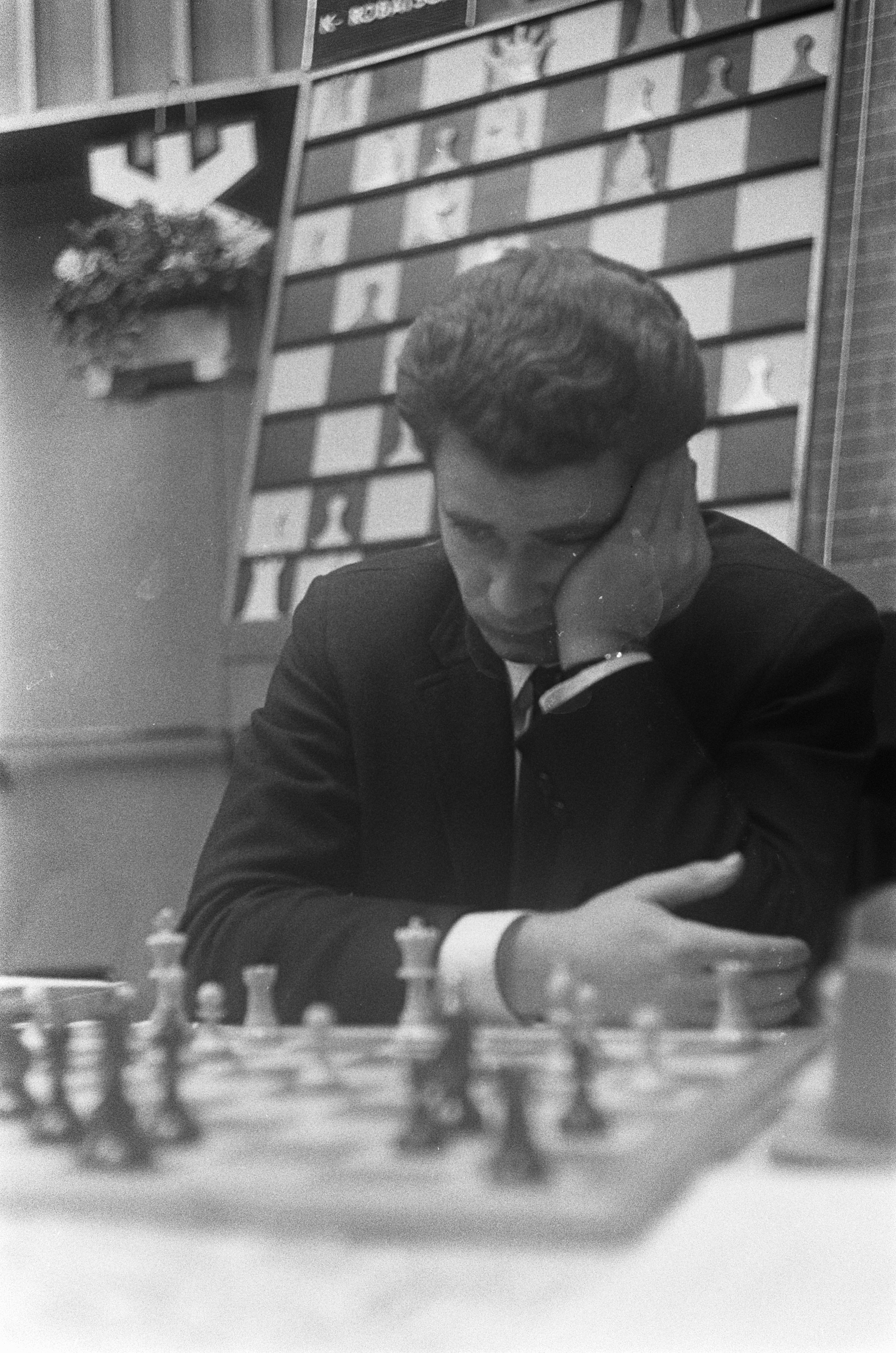 Collectie / Archief : Fotocollectie Anefo Reportage / Serie : [ onbekend ] Beschrijving : Hoogoven Schaaktoernooi, grootmeester B. Spaski Datum : 11 januari 1967 Trefwoorden : Schaaktoernooien Persoonsnaam : B. Spaski Fotograaf : Koch, Eric / Anefo Auteursrechthebbende : Nationaal Archief Materiaalsoort : Negatief (zwart/wit) Nummer archiefinventaris : bekijk toegang 2.24.01.05 Bestanddeelnummer : 919-9772